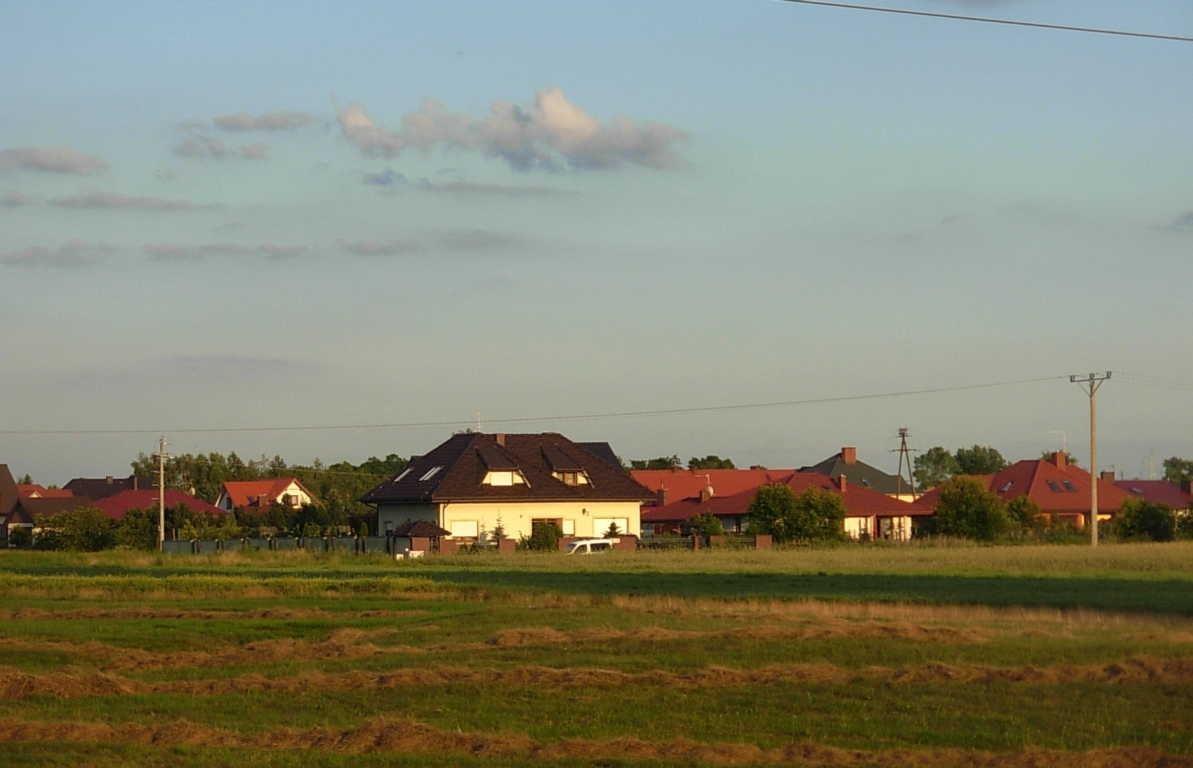 Przyłęki k. Bydgoszczy, gmina Białe Błota